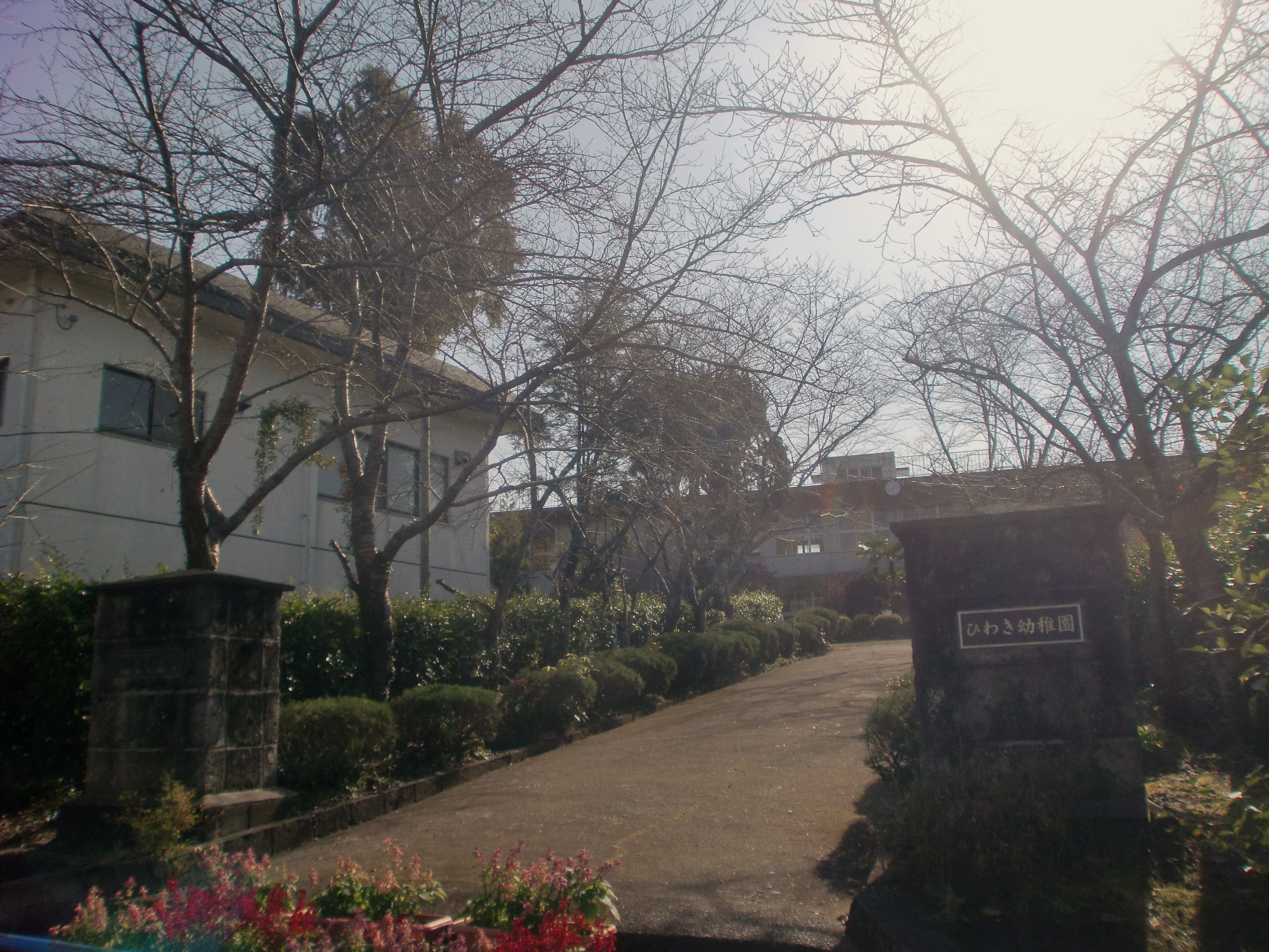 薩摩川内市立樋脇小学校の外観。